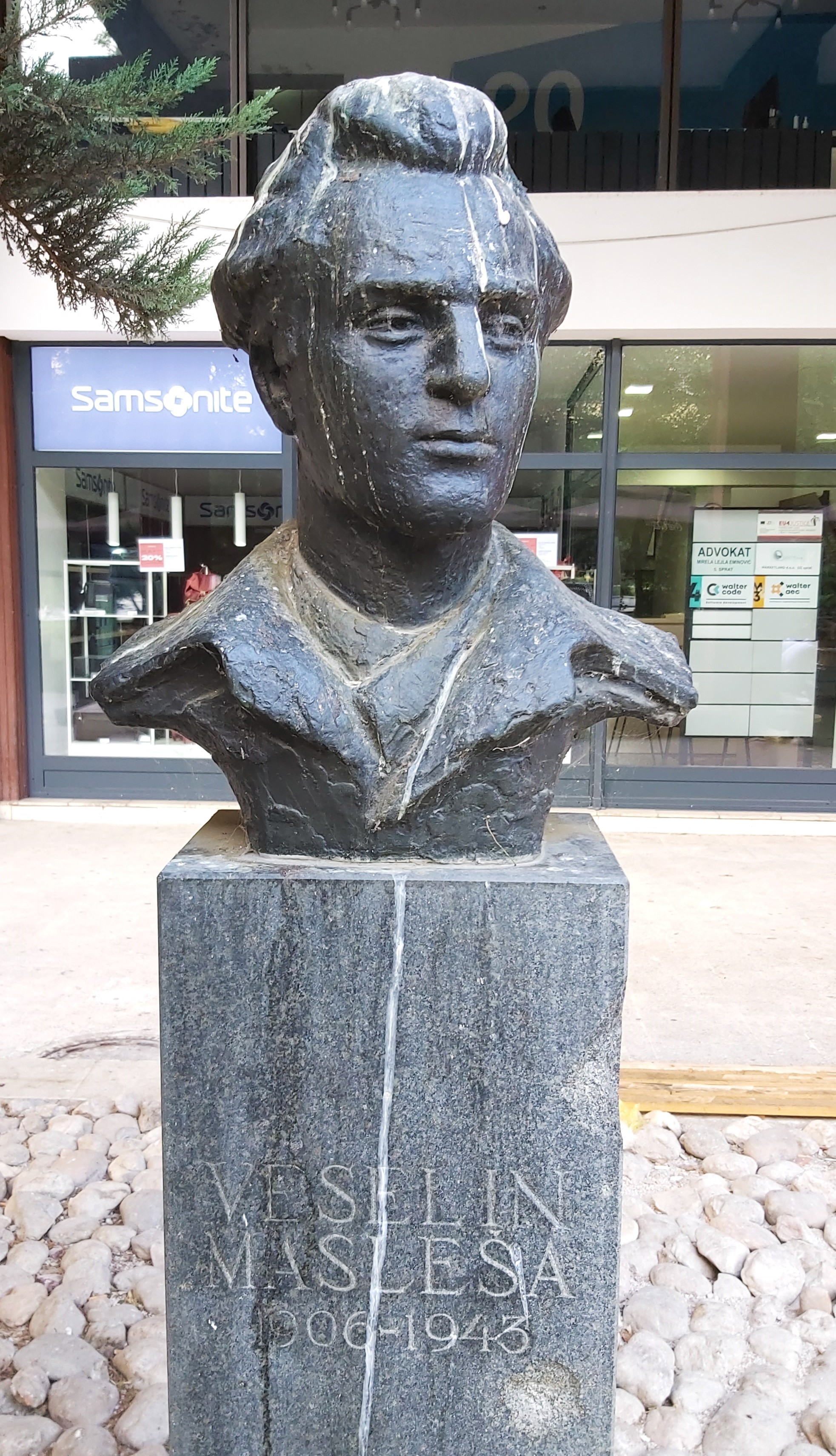 Veselin Masleša, bista u Sarajevu